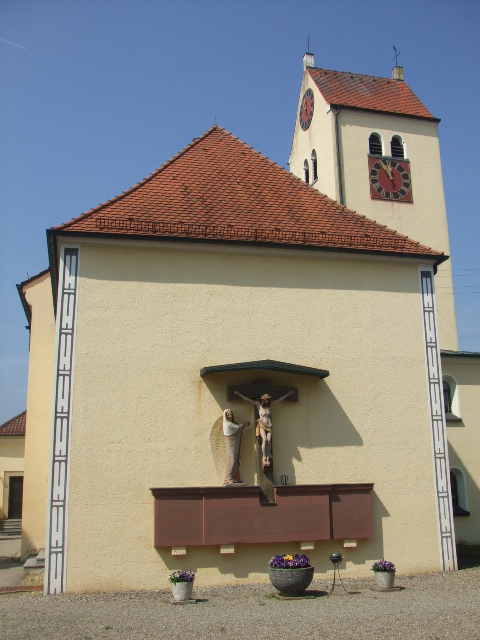 Pfarrkirche St. Gallus, Schönebürg, Gemeinde Schwendi, Landkreis Biberach Außenansicht